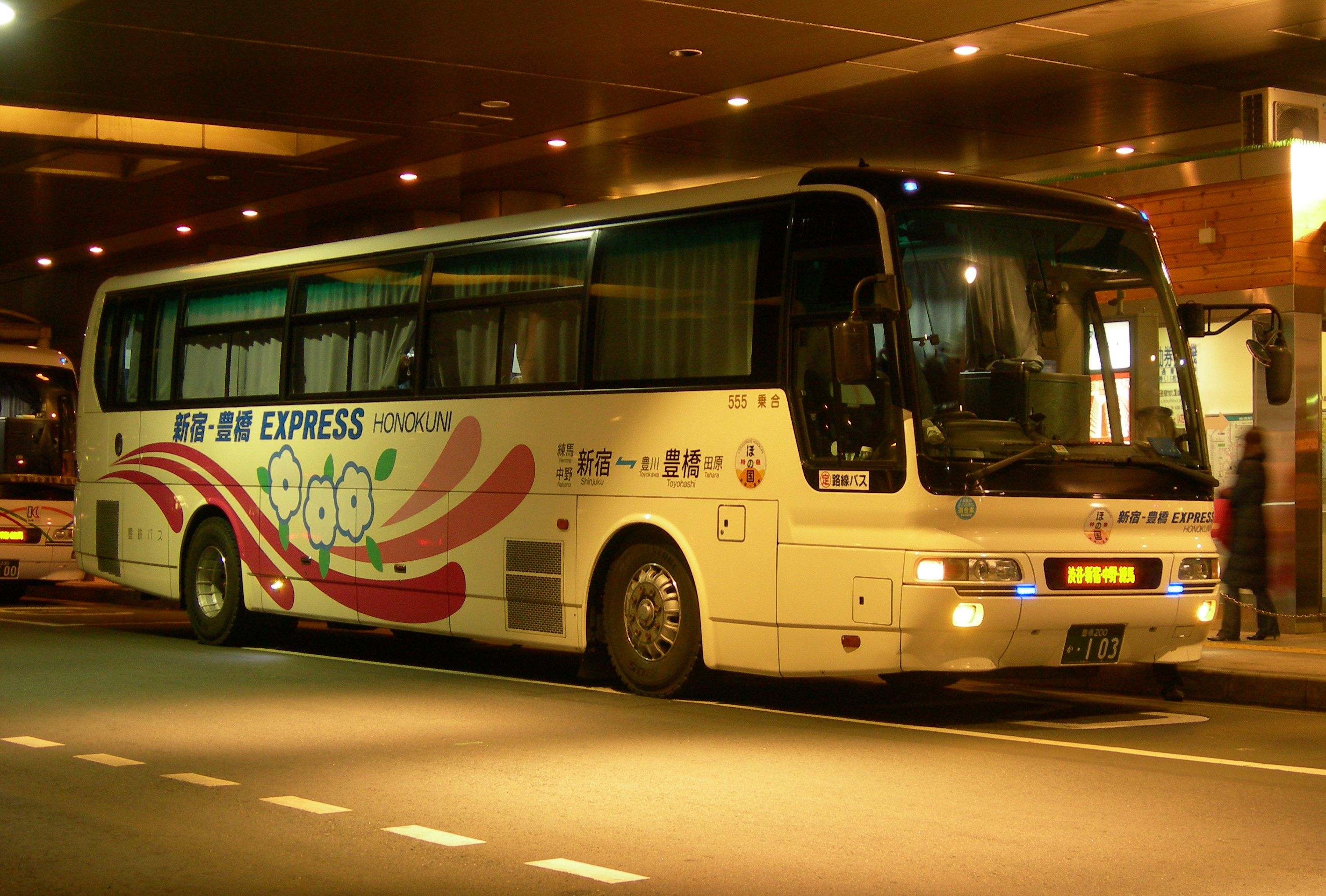 豊鉄バス 「新宿・豊橋エクスプレス ほの国号」